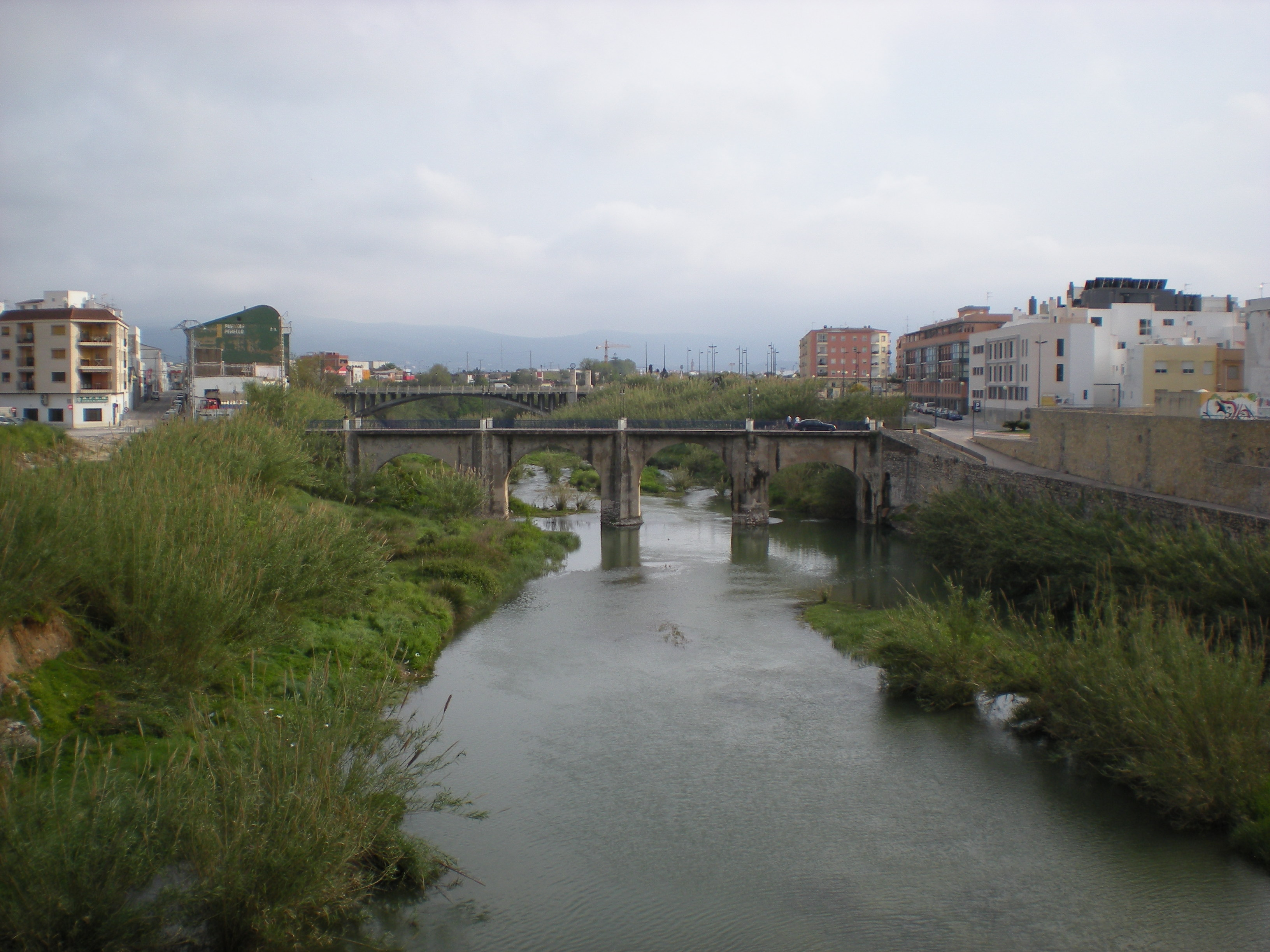 Riu Serpis (Gandia)